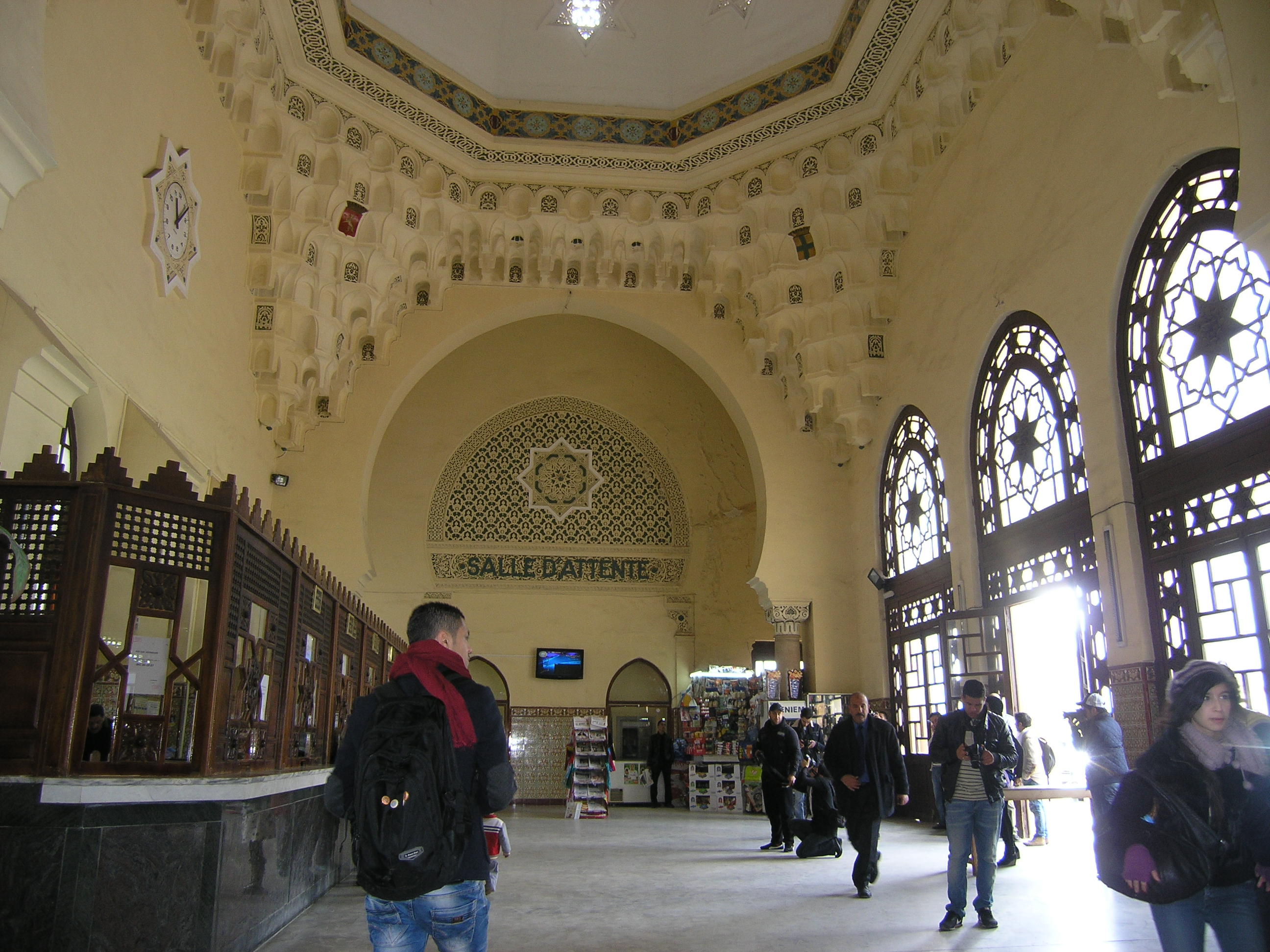 Institut français en partenariat avec ISOClub et l'association la grande maison de Tlemcen organisent Les journées de la Photo 2014 du 11 au samedi 15 février 2014.